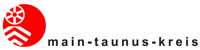 Main-Taunus-Kreis Logo. Gestaltet von Dejan Pavlovic 2002.